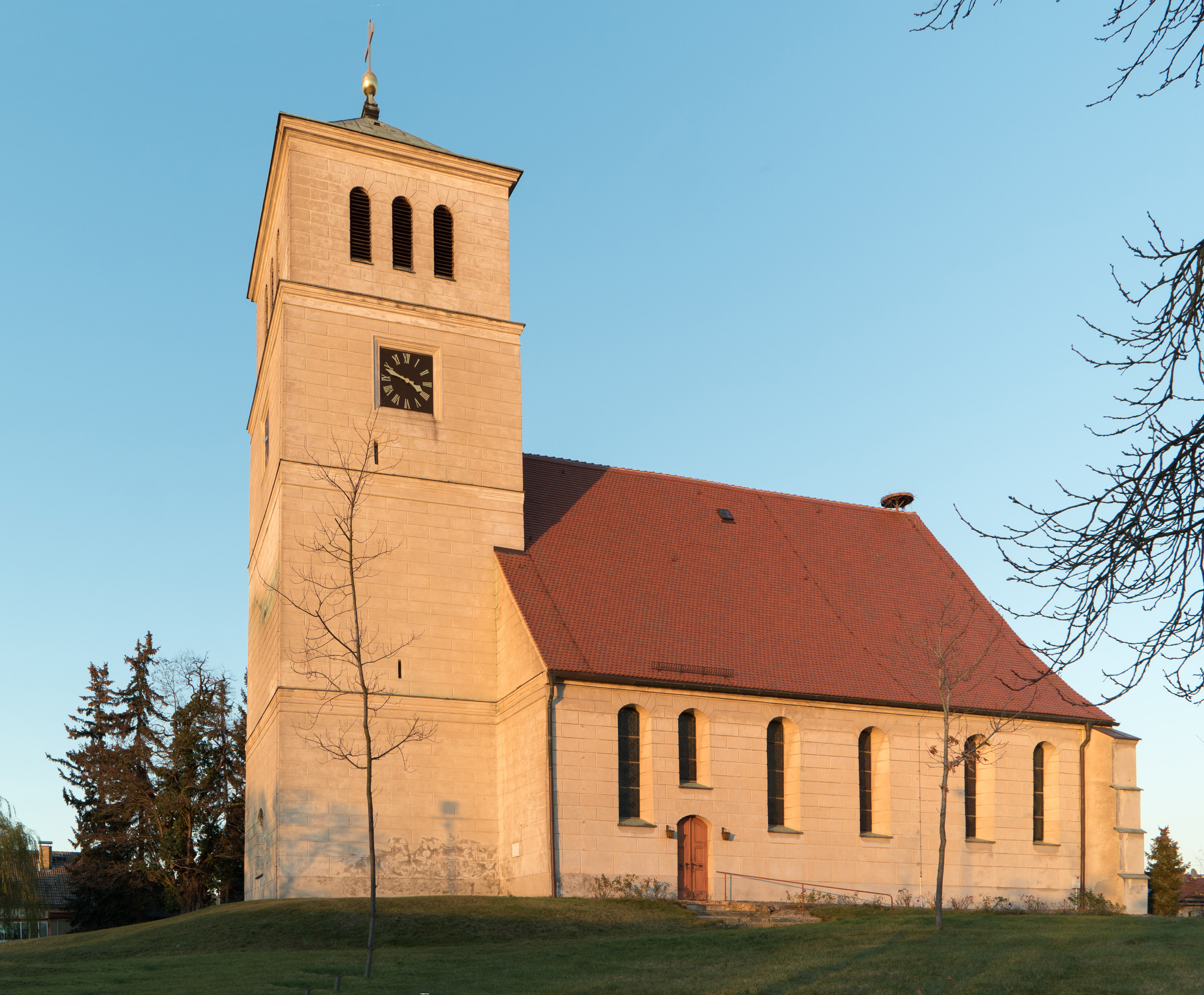 Stadtkirche St. Marien im warmen Licht der Abendsonne, Kirchberg 1 in Schildau